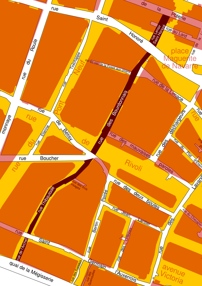 La rue des Bourdonnais à Paris en 1793-1795 (plan des sections, feuille 34) avec, en superposition, le tracé contemporain (2014) des rues